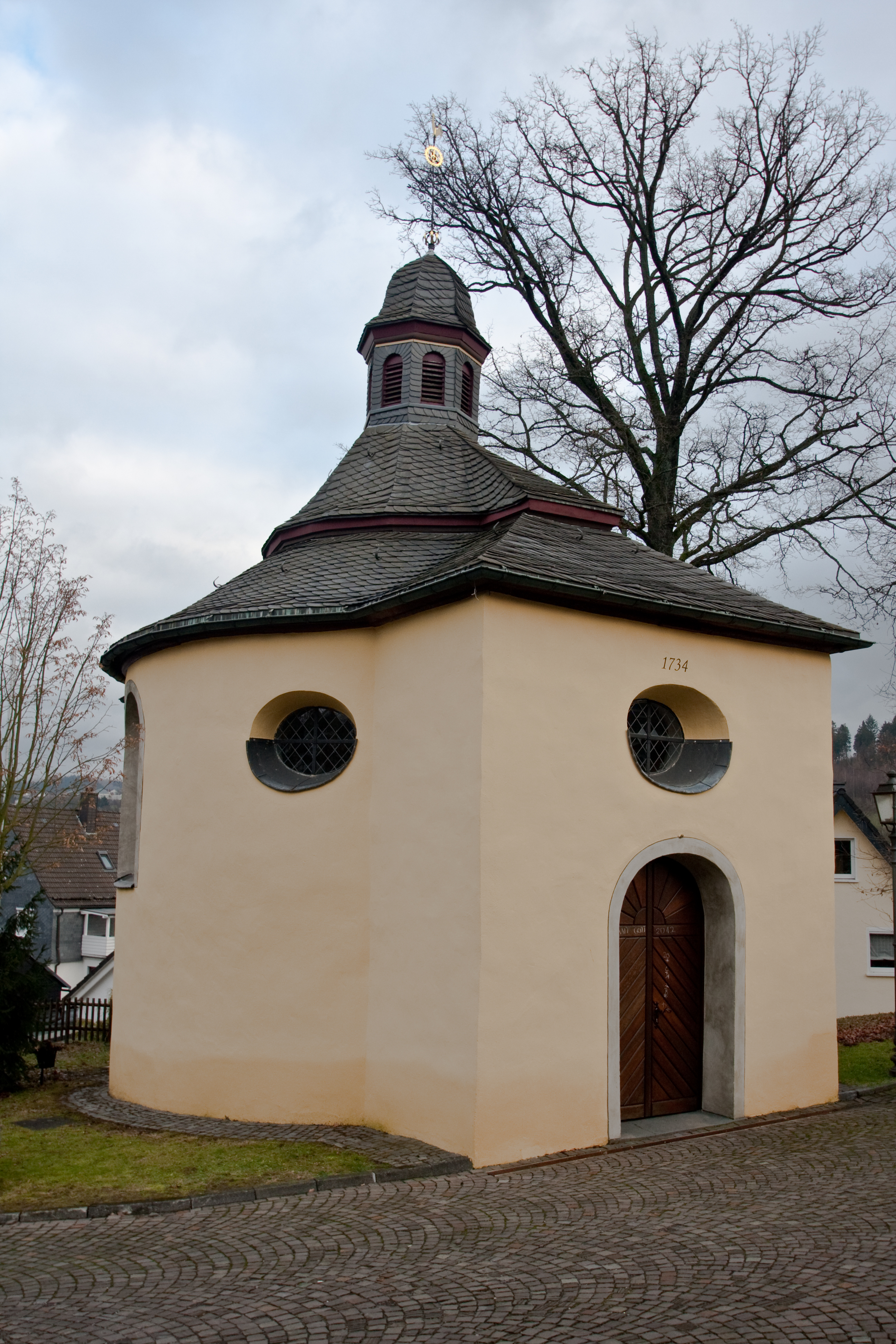 Ansicht der katholischen Kapelle St. Matthäus und Leonhard in Olpe.